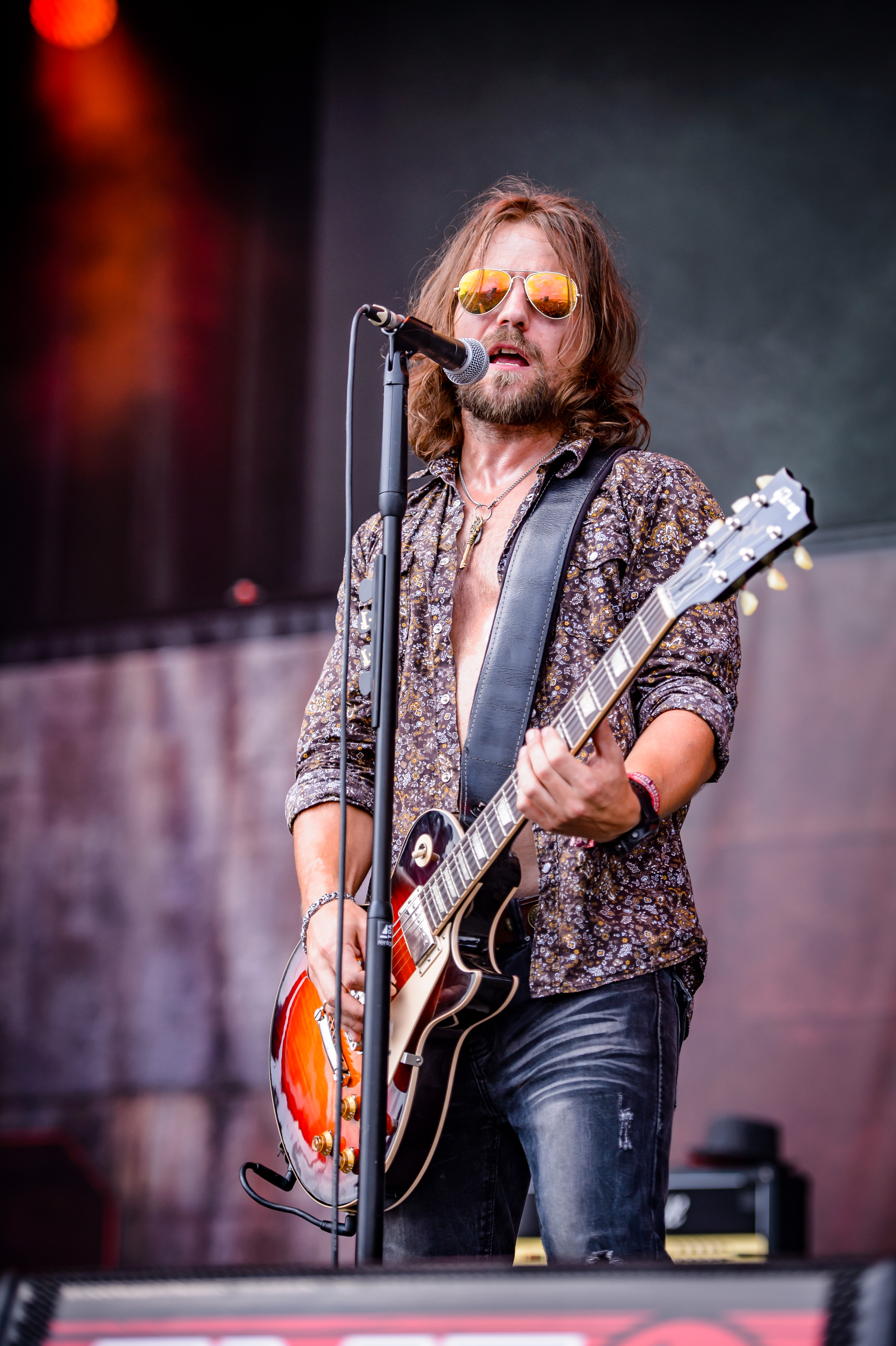 'Summer Breeze Festival 2017; Dinkelsbühl': 'The new Roses'